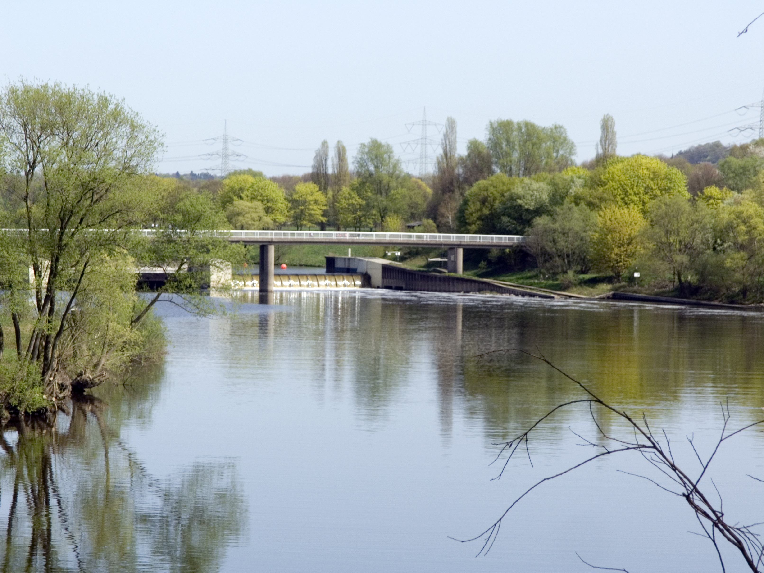 Северный Рейн - Вестфалия. Плотина Кемнадер